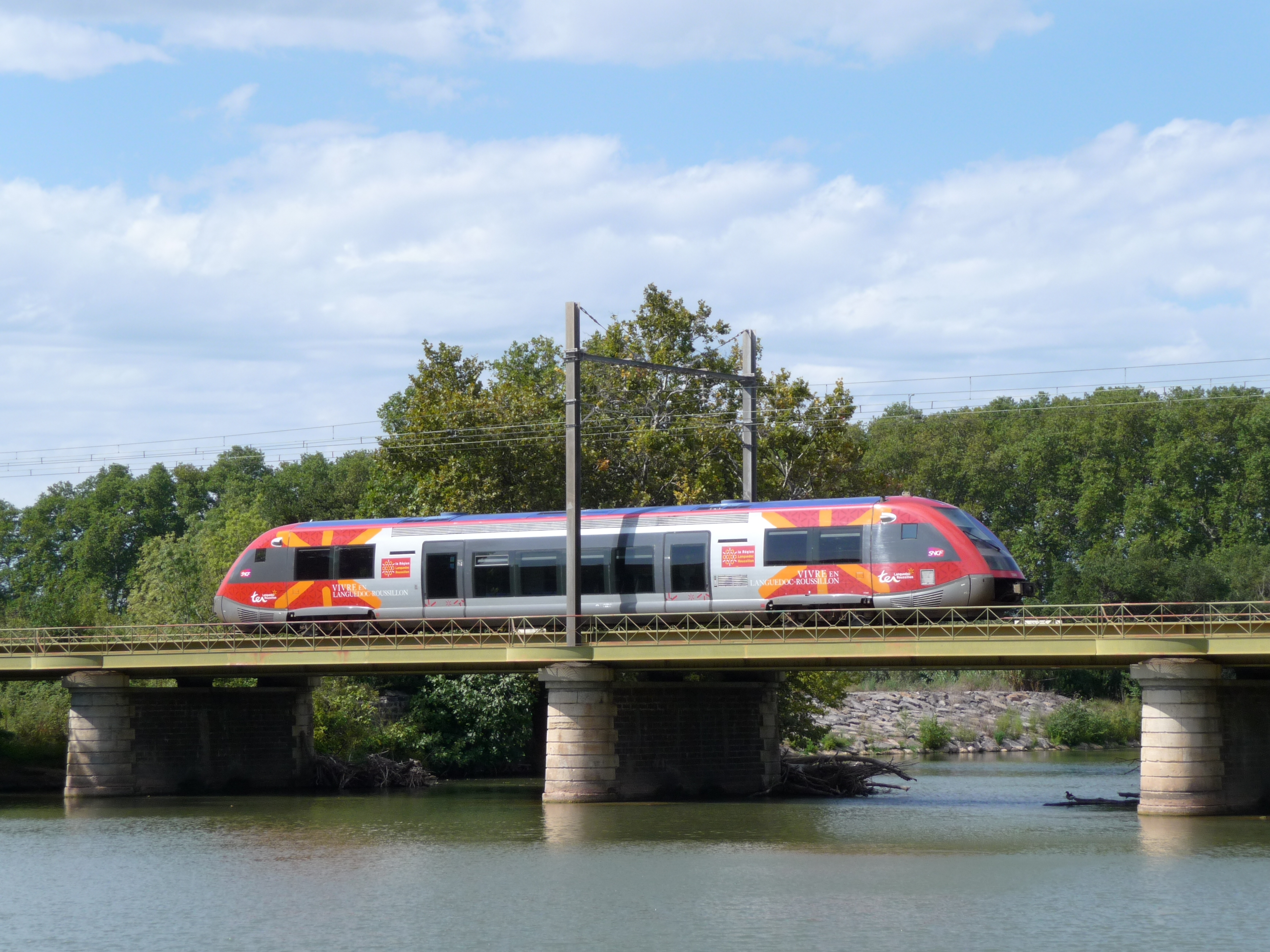 Rame TER franchissant l'Hérault à Agde (Hérault, France)